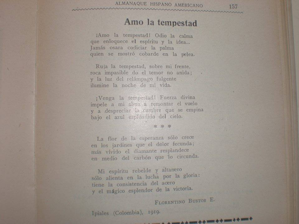 Poema publicado en la revista Hispanoamericano de la Casa Maucci, Barcelona.